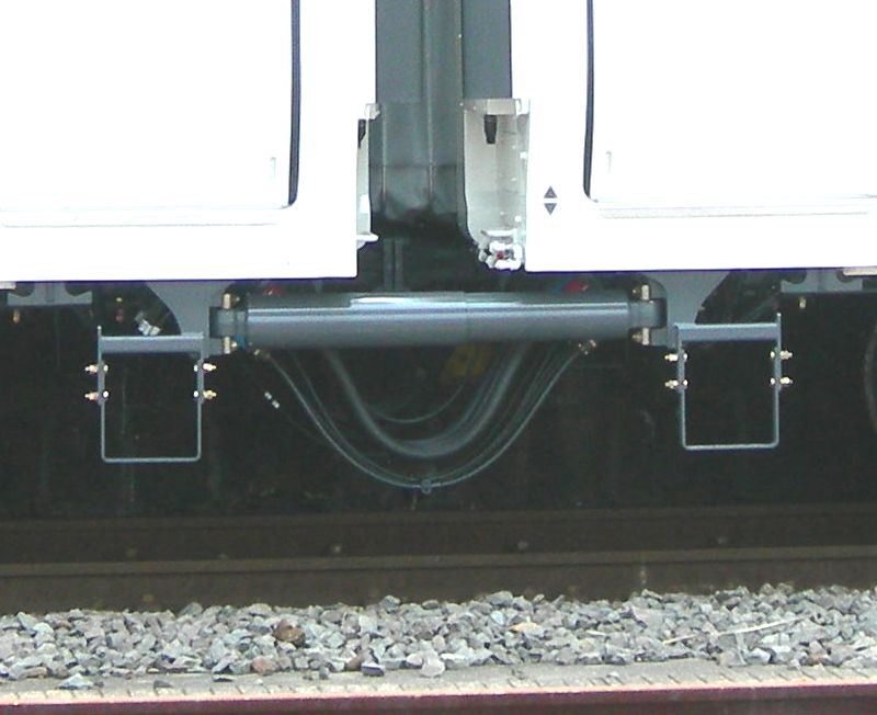 JR東日本E259系車体間ダンパ （横須賀駅にて）